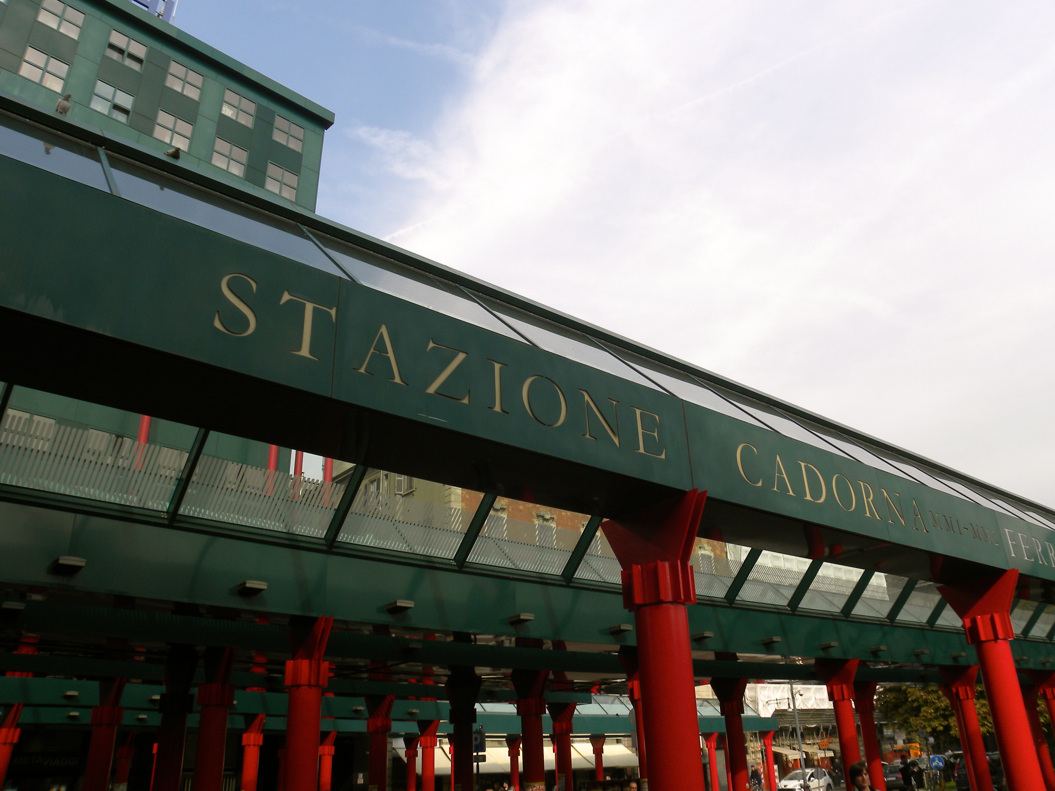 Scorcio della facciata della stazione di Milano Cadorna